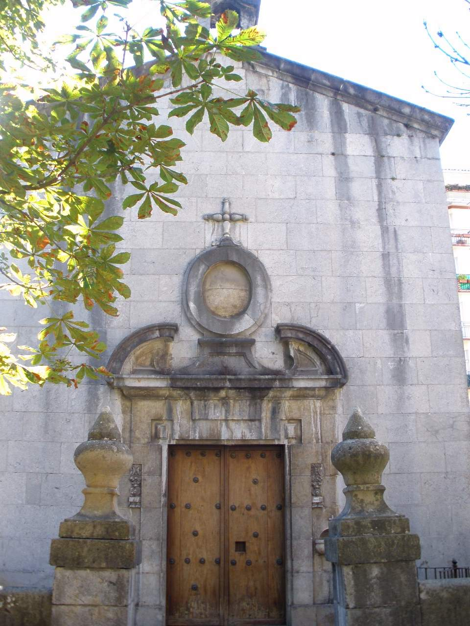 Azkoitia - Ermita de San Jose